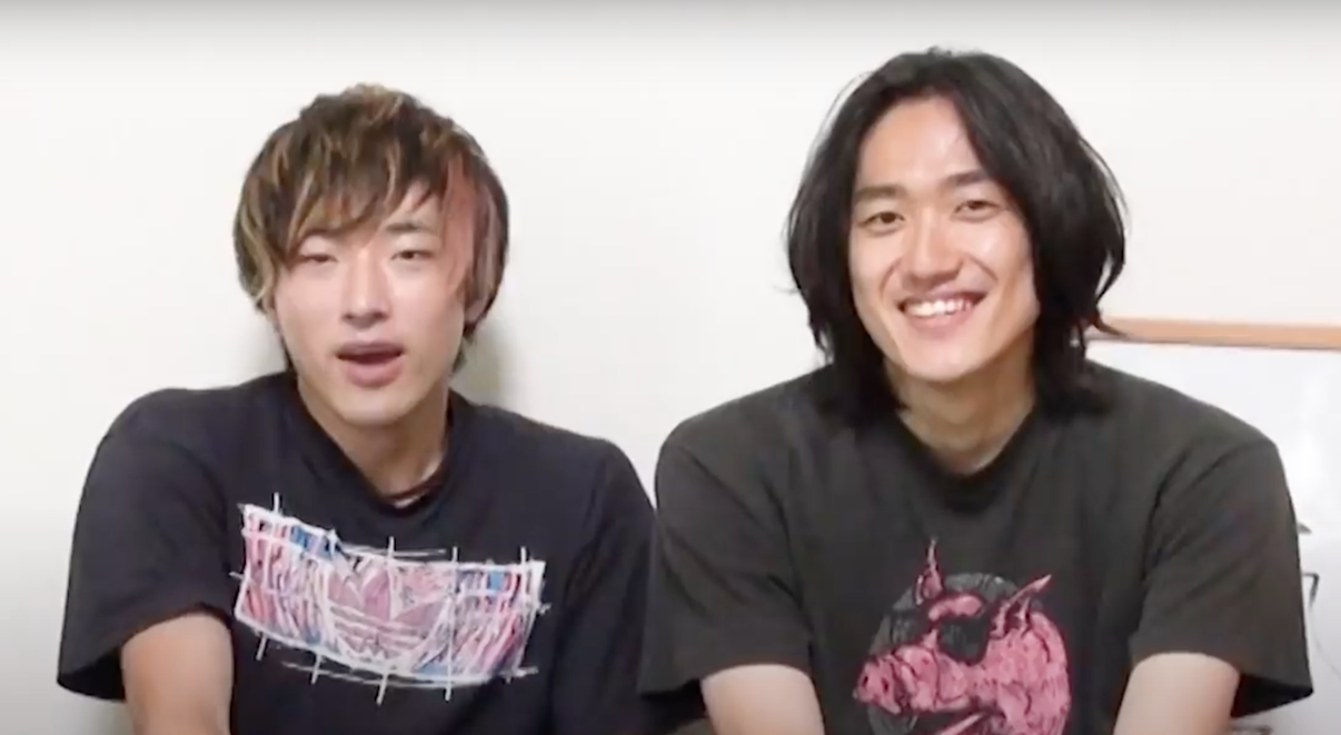 YouTuberの北の打ち師達。原典動画の0:12より。